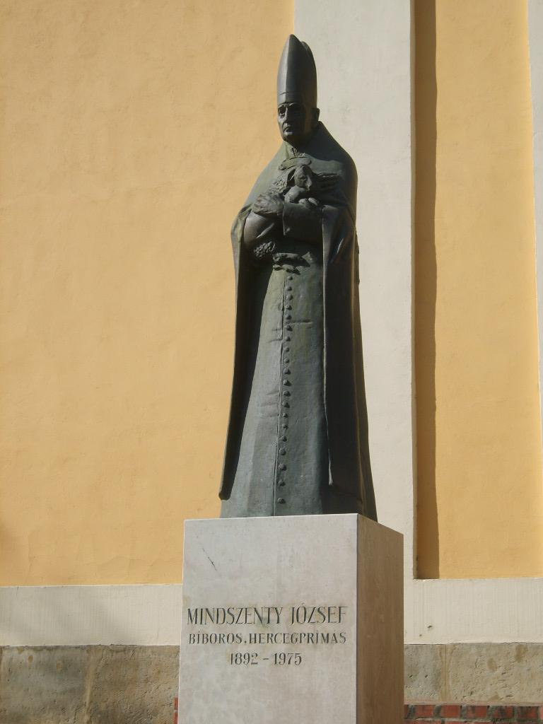 Mindszenty József szobra Zalaegerszegen. Kiss Sándor (1925–1999) és Vadász György (*1933) alkotása (1995)